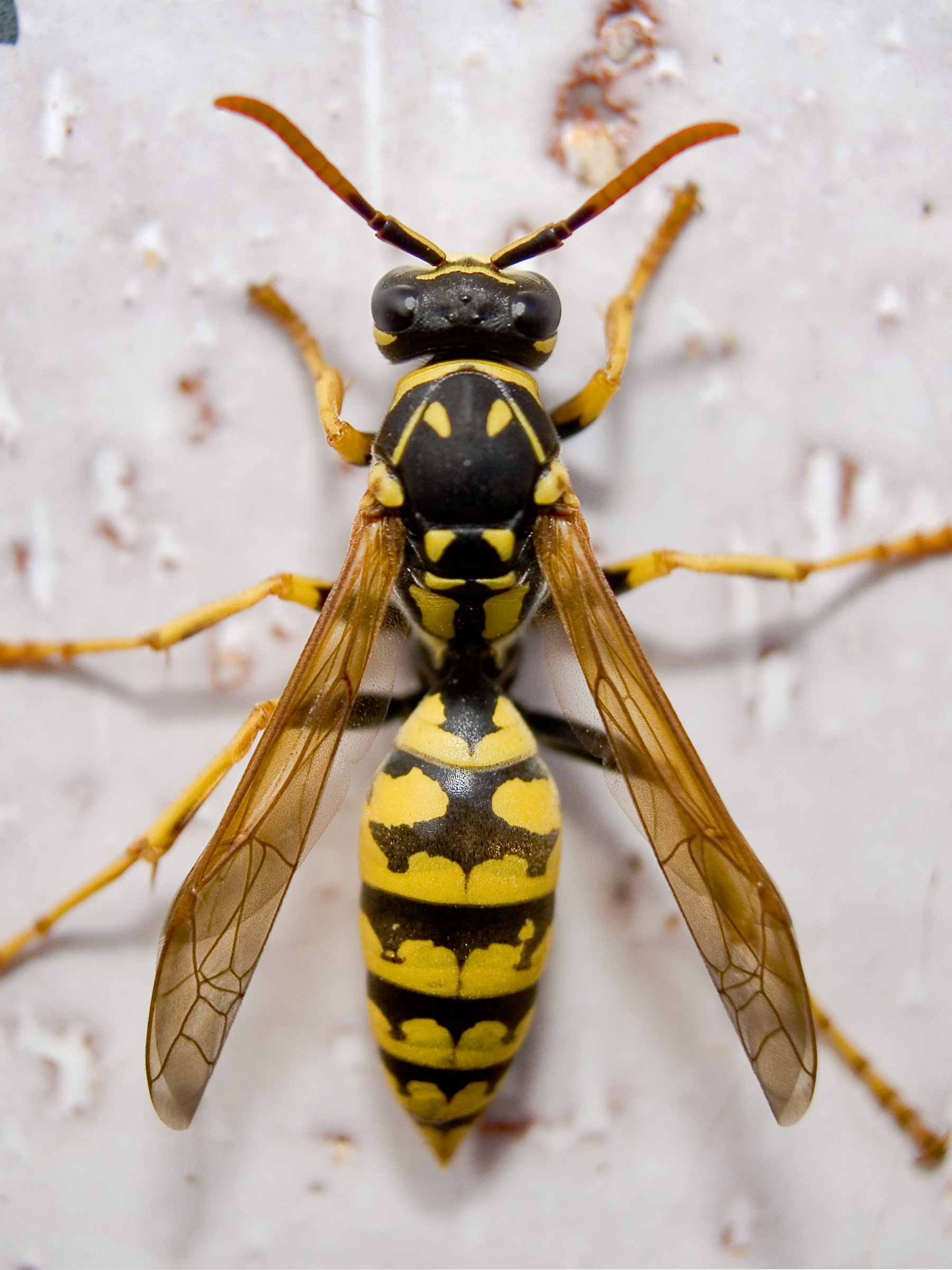 Explore: #195, 10 Abril